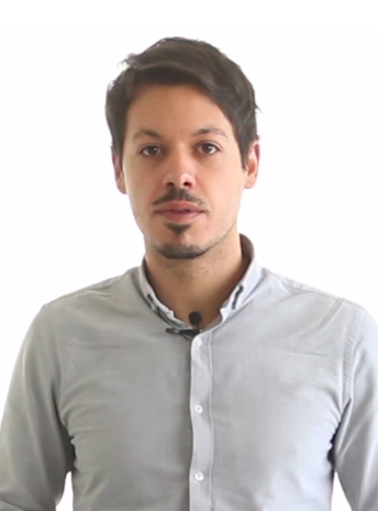 Los ayuntamientos cumplen a rajatabla con el pago de la deuda pero la regla de gasto de Montoro les impide invertir más dinero en servicios públicos.